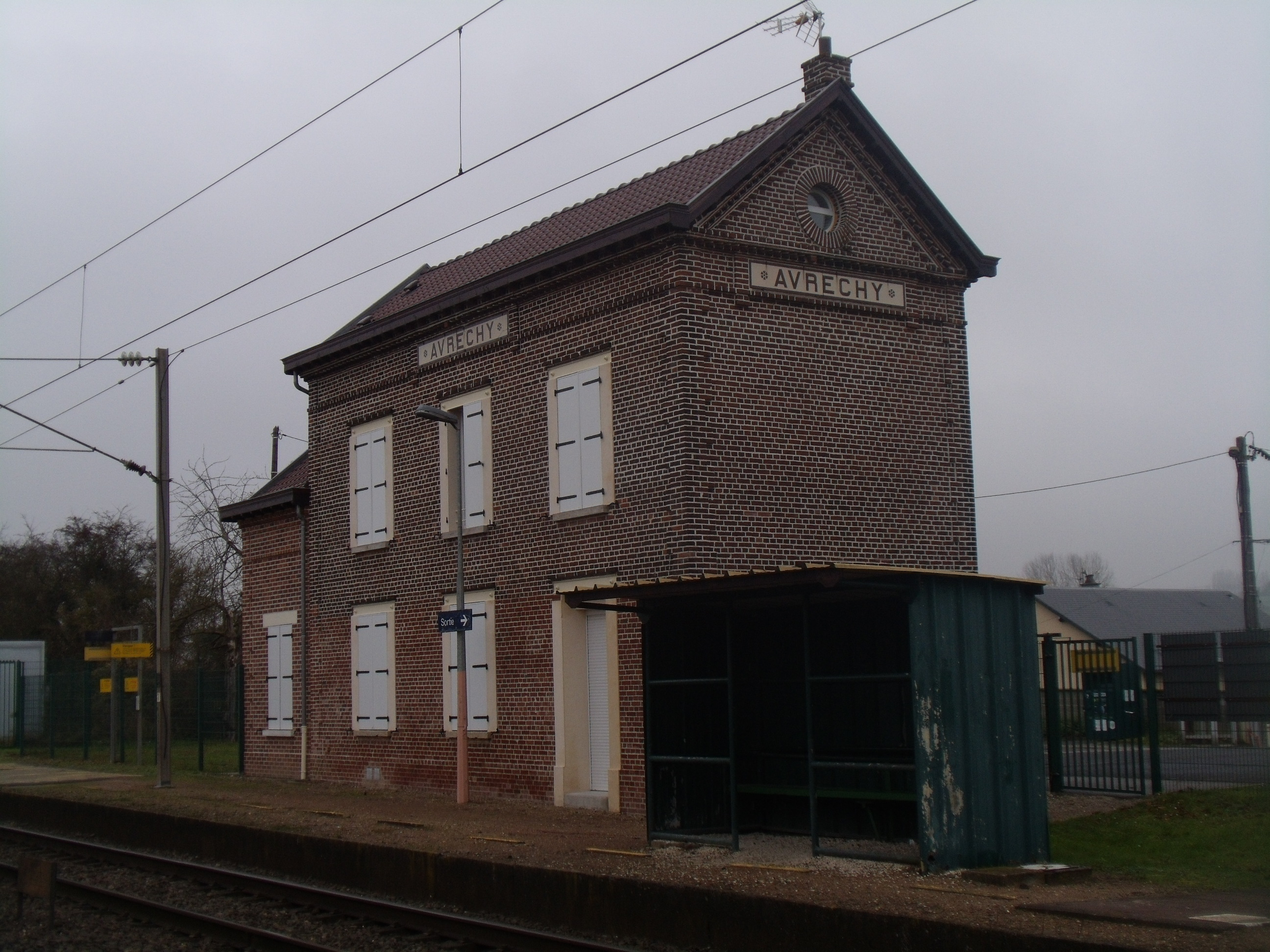 le bâtiment voyageurs sur le quai vers Creil